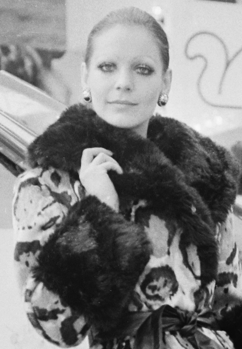 Pogány Klári manöken.